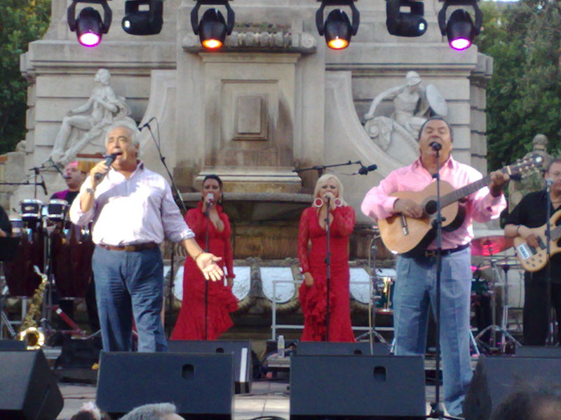 Los del Río